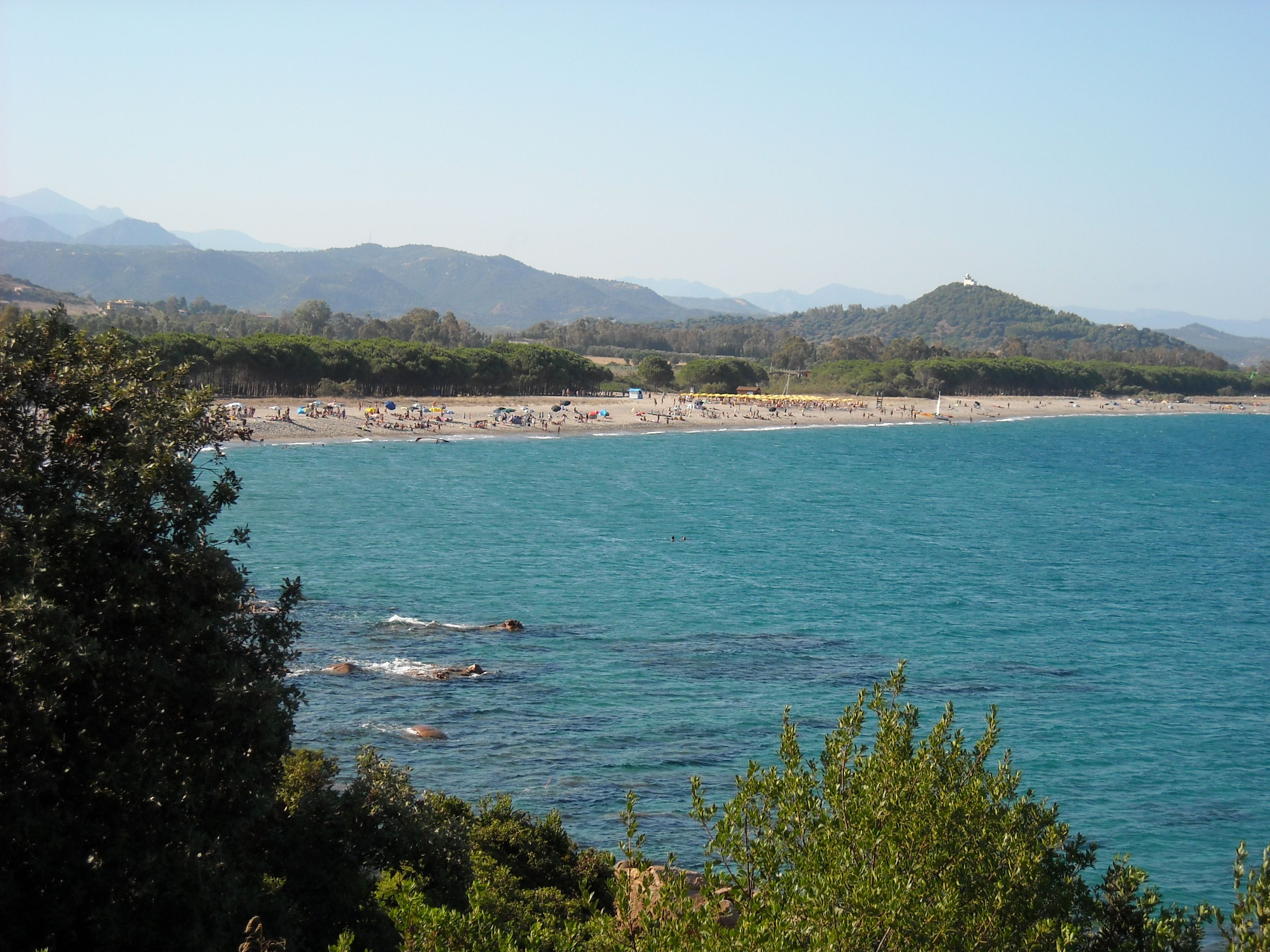 Sa perda e pera